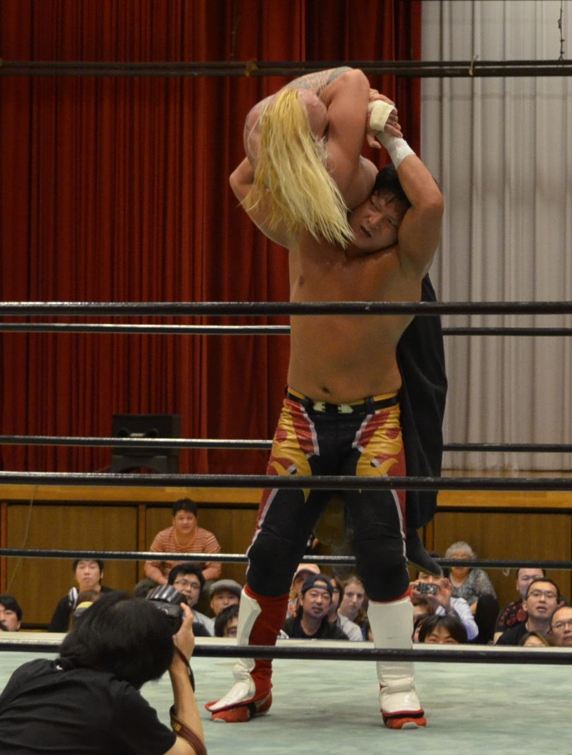 羅喉（らごう）